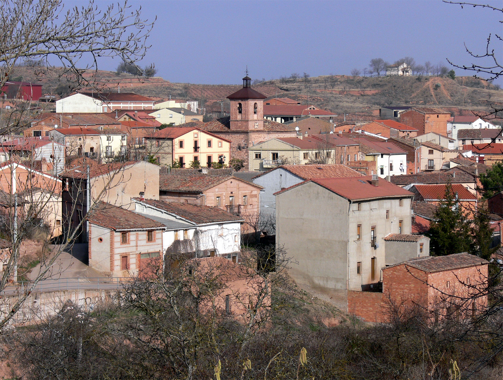 Cordovín, municipio de La Rioja (España)